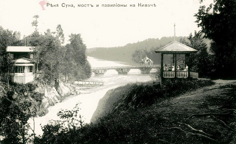 Водопад Кивач на реке Суна, павильоны. Олонецкая губерния. 1904 год